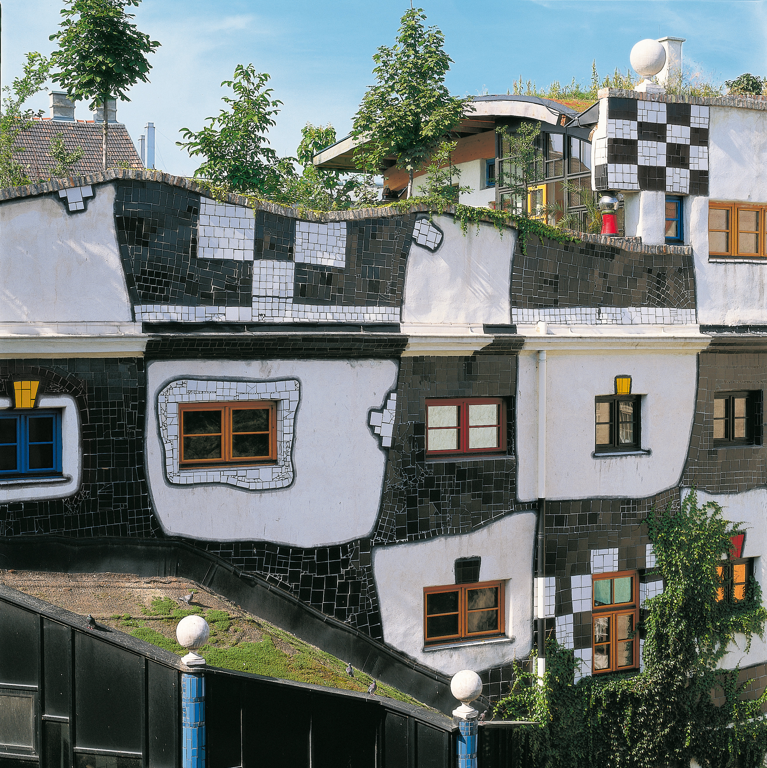 KunstHausWien, Vídeň, Rakousko